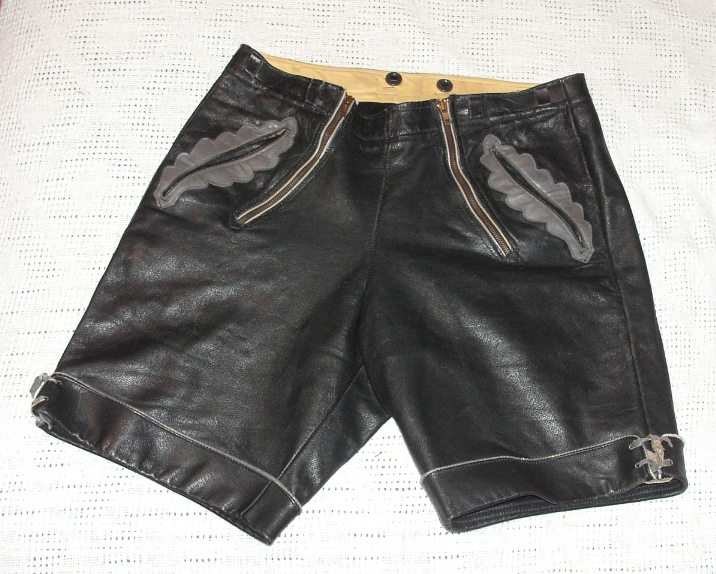 Men in lederhosen